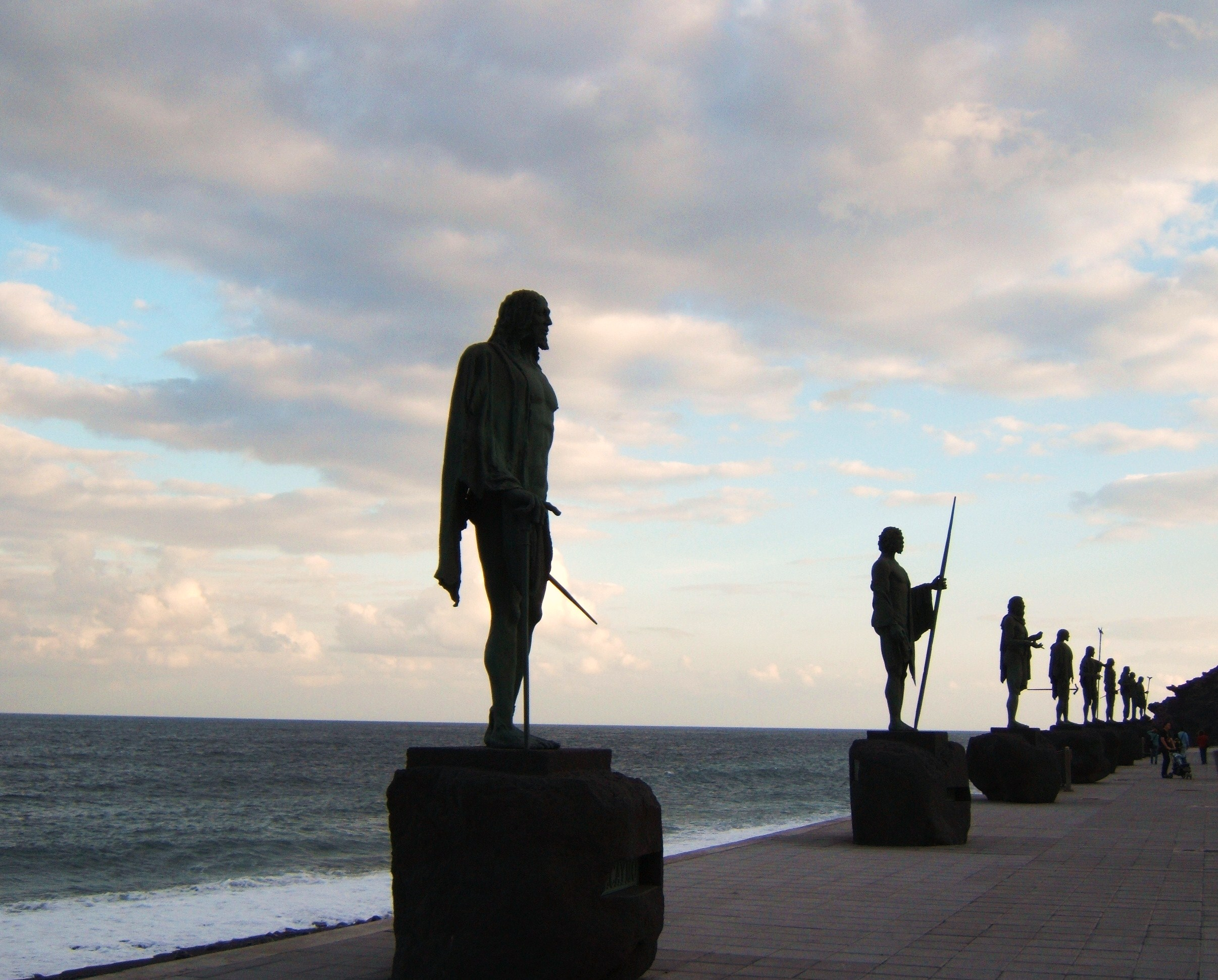 plaza de la Patrona de Canarias